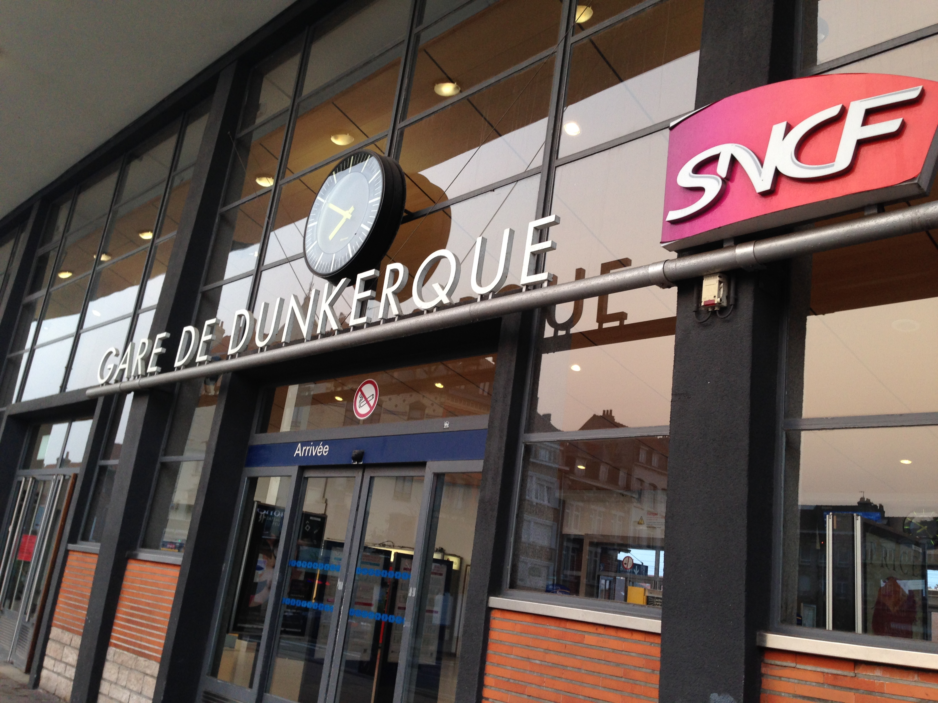 Gare de Dunkerque (façade)